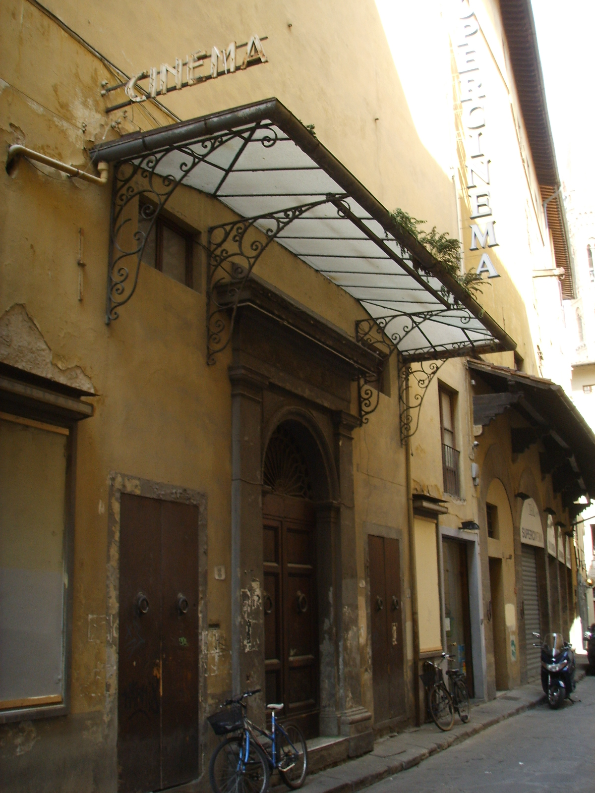 Ex-Ospizio_della_Quarconia